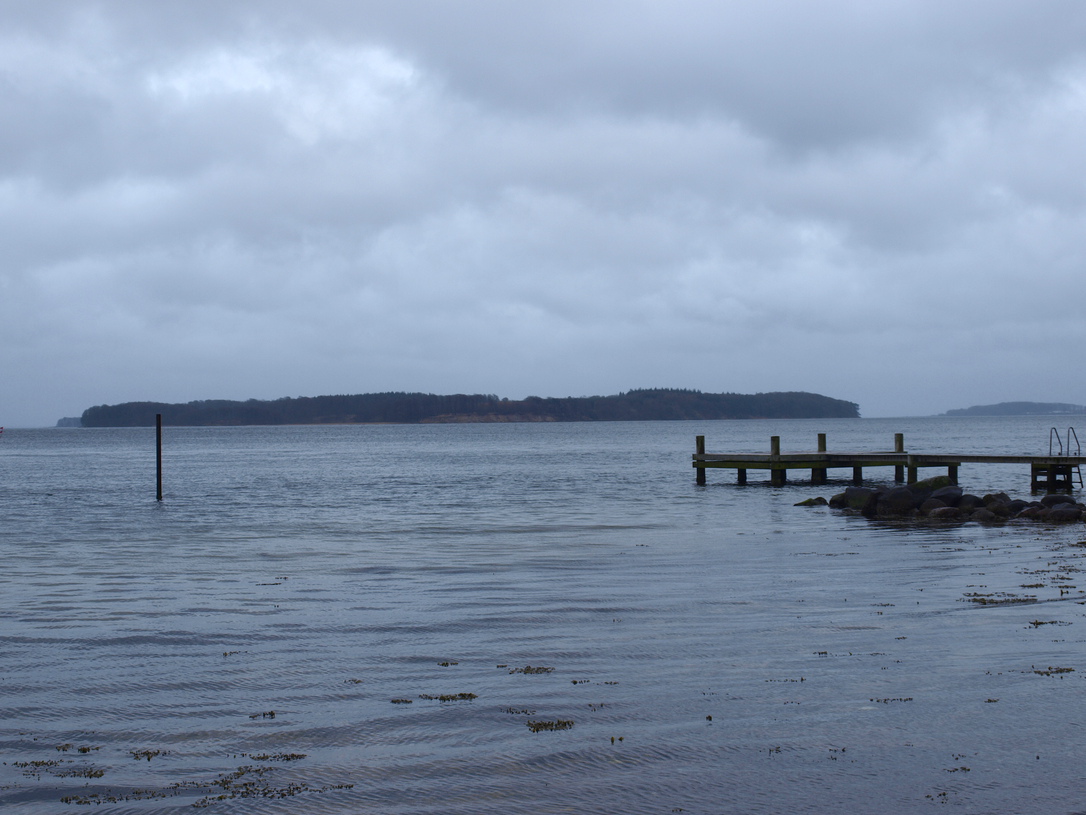 Fænø set fra Jylland, d. 13. april 2015